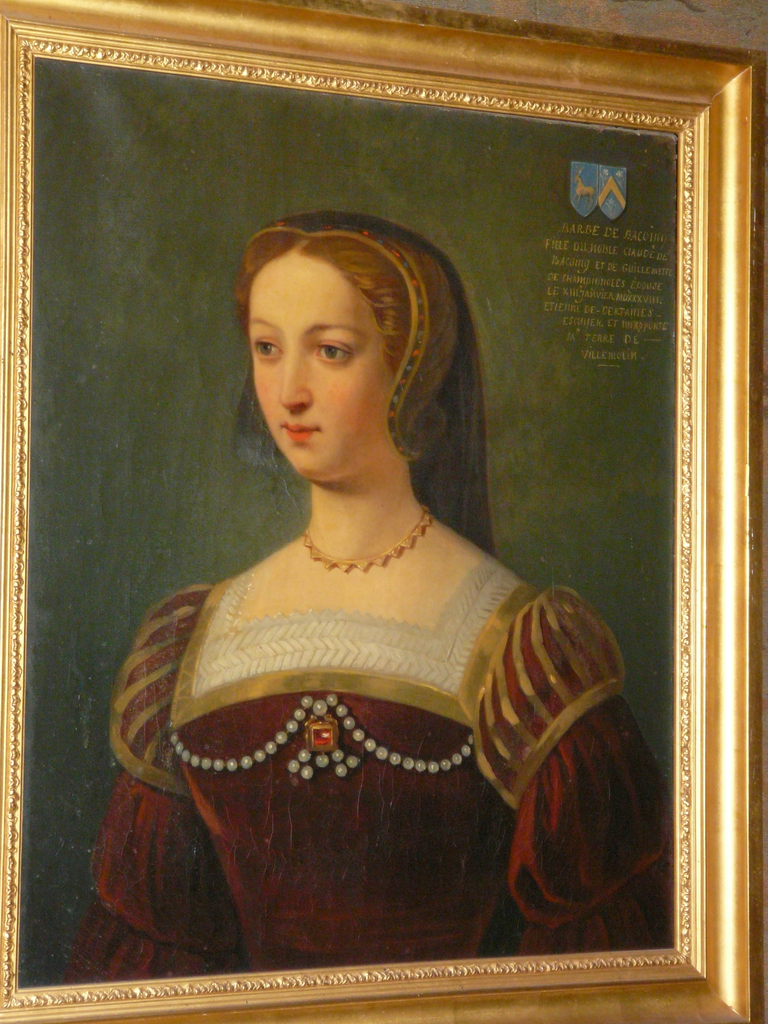 Portrait posthume, château de Villemolin